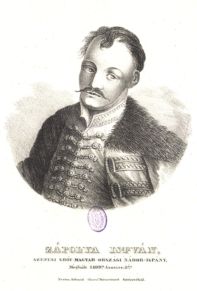 Szapolyai István 1490-ben Ausztria kormányzója, Bécs kapitánya, 1492 – 99-ben nádor, 19. századi litográfia. (257 x 169 mm)